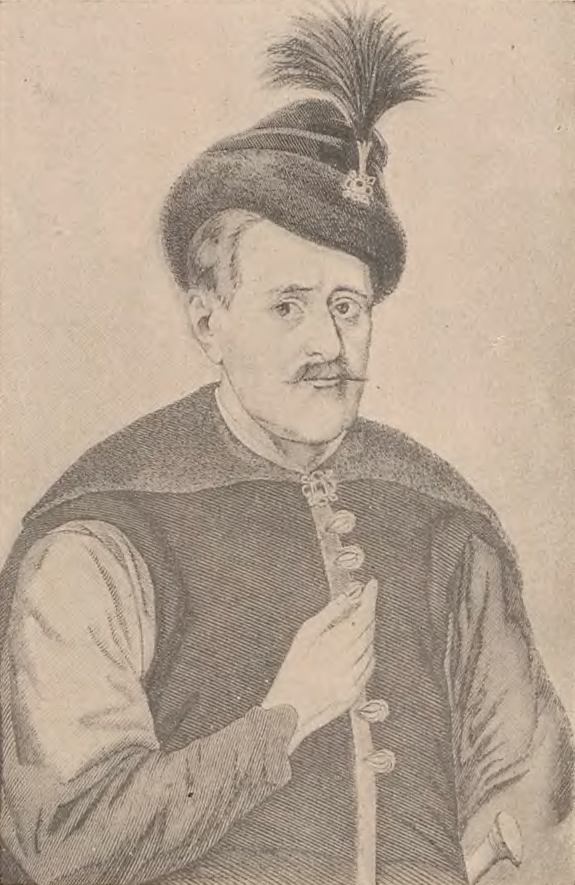 Беларуская (тарашкевіца): Партрэт Адама Аляксандра Сангушкі (Adam Alaksandar Sanguška)